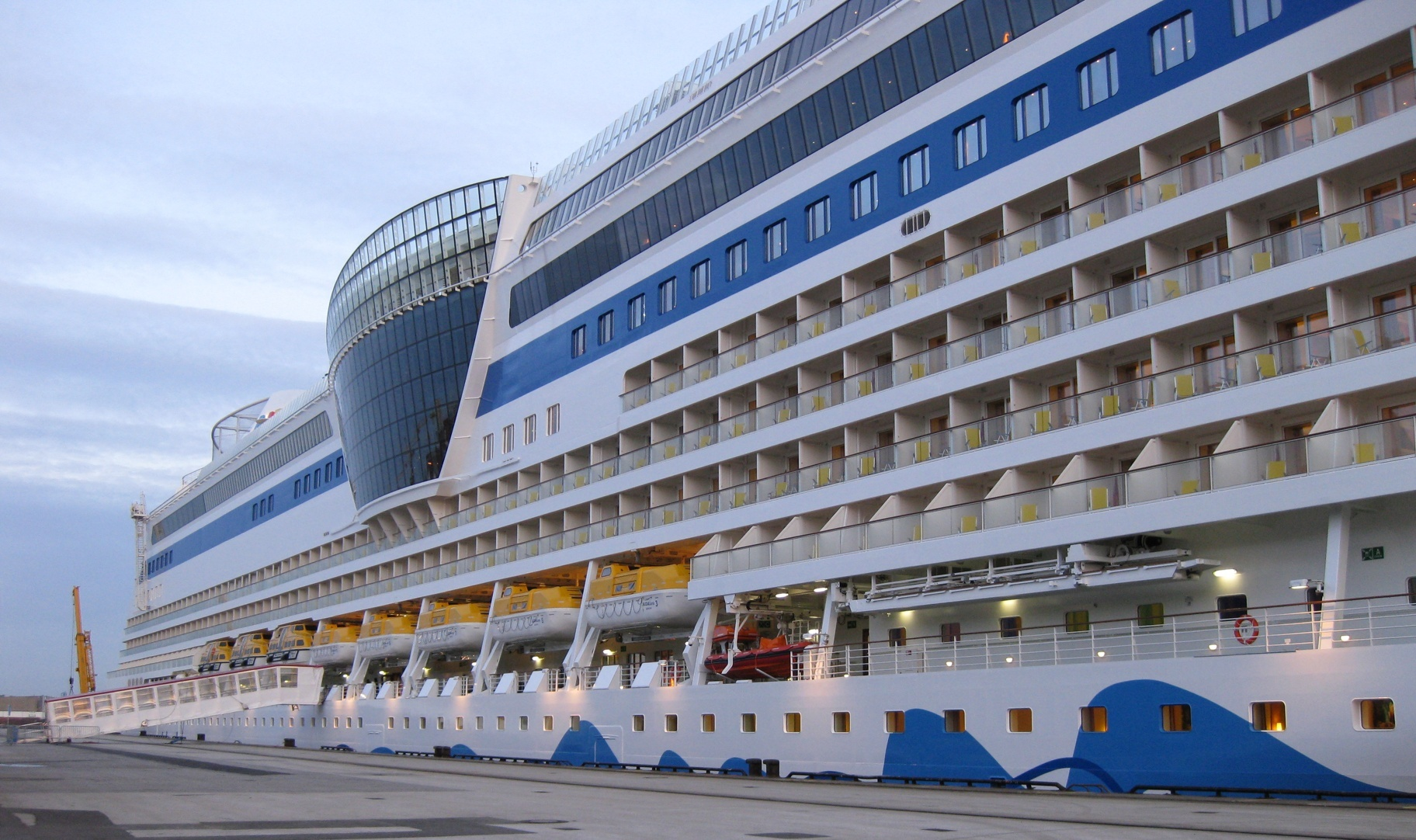 AIDAluna am Kreuzfahrtterminal in der Hamburger HafenCity - Seitenansicht